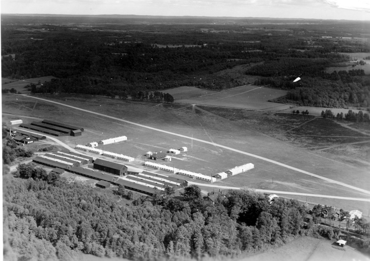 Vy över Tånga Hed